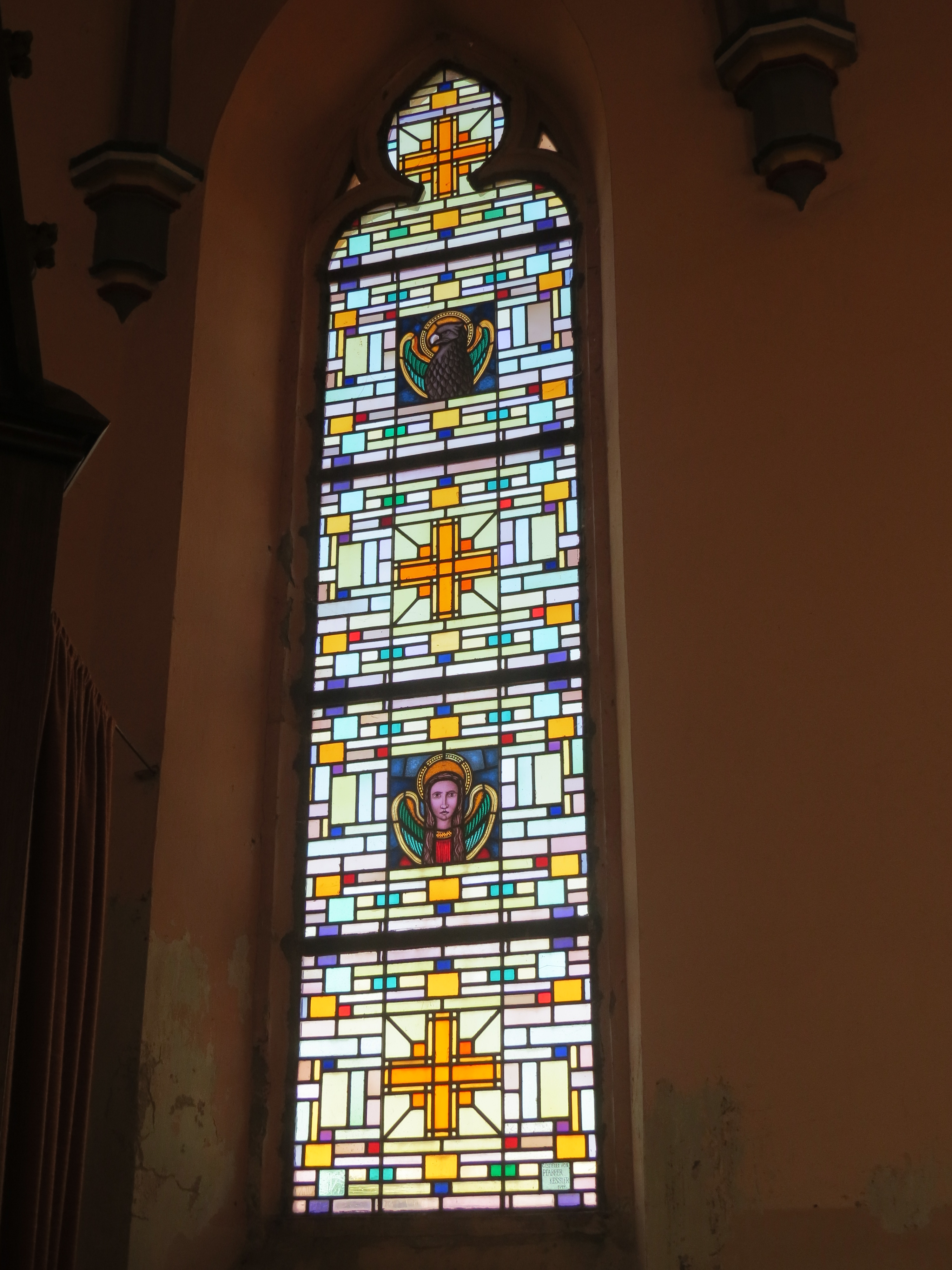 Kirchenfenster